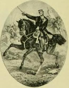 General José Joaquim de Andrade Neves, Barão do Triunfo.